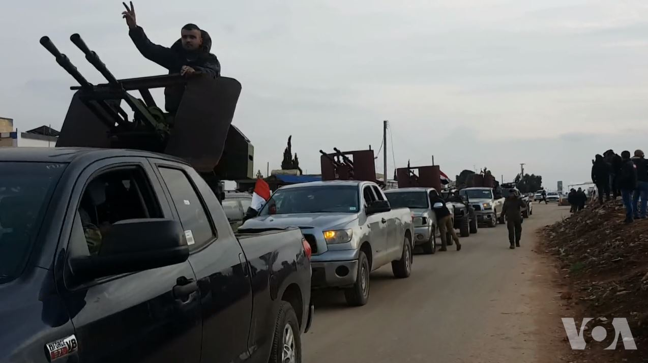 Entrée de milices pro-régime syriennes à Afrine le 20 février 2018.